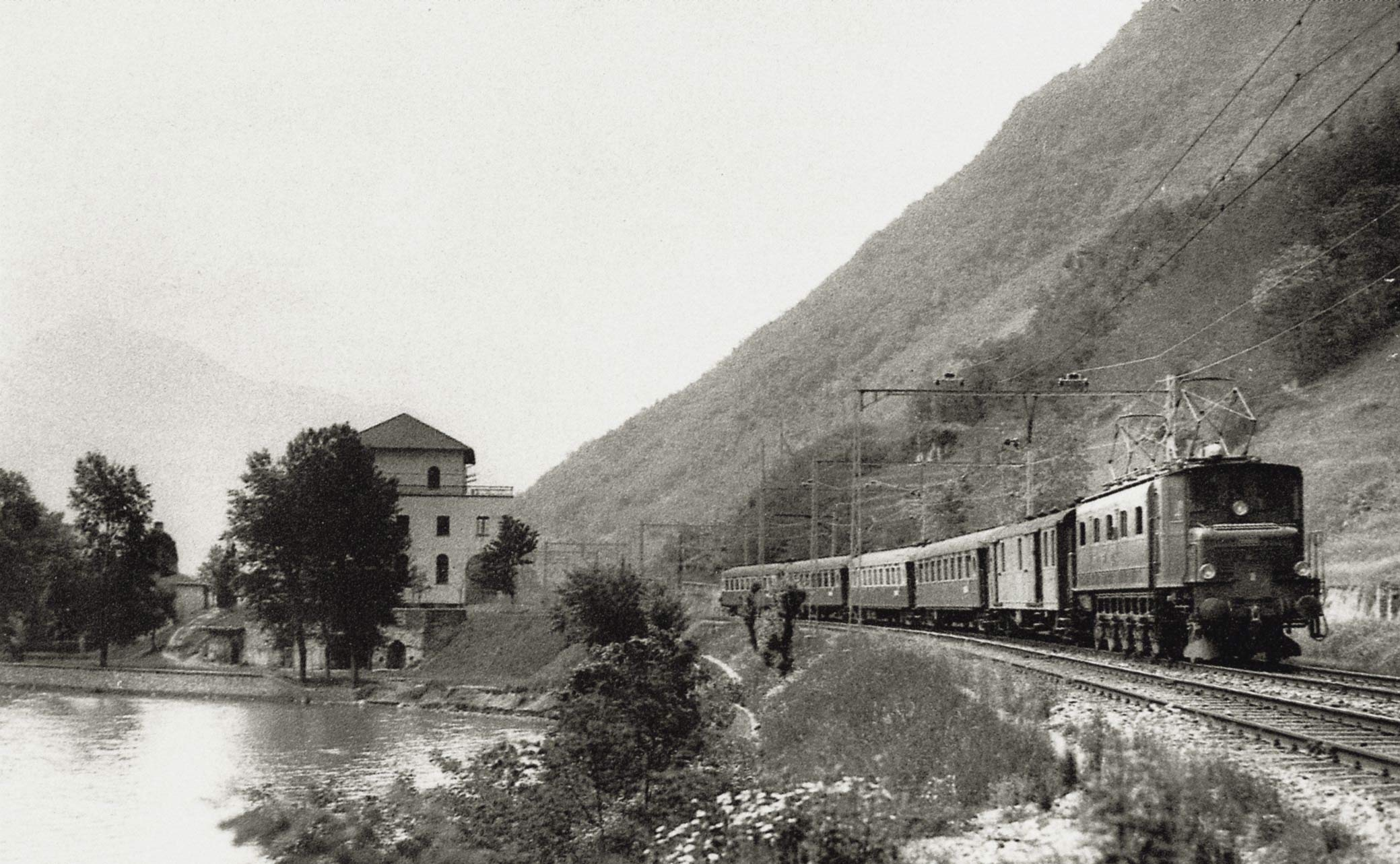 Gotthard-Pullmann-Express mit Ae 4/7 bei Melide.